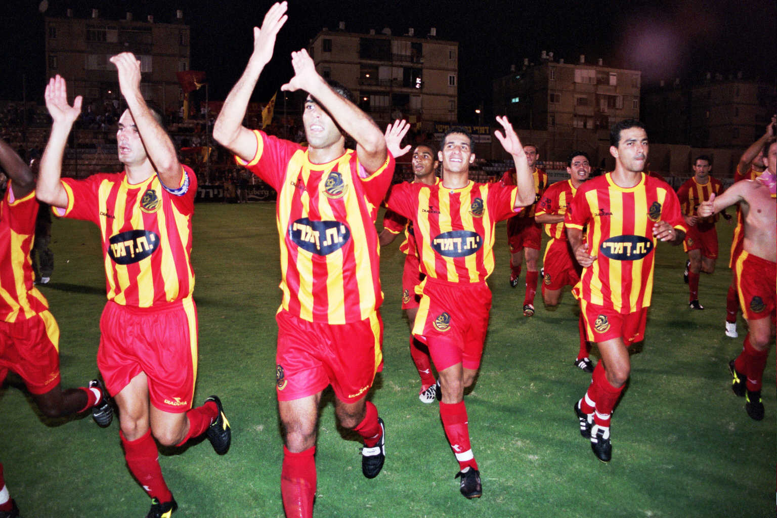 שחקני הקבוצה חוגגים ניצחון בית. (ספטמבר 2003)